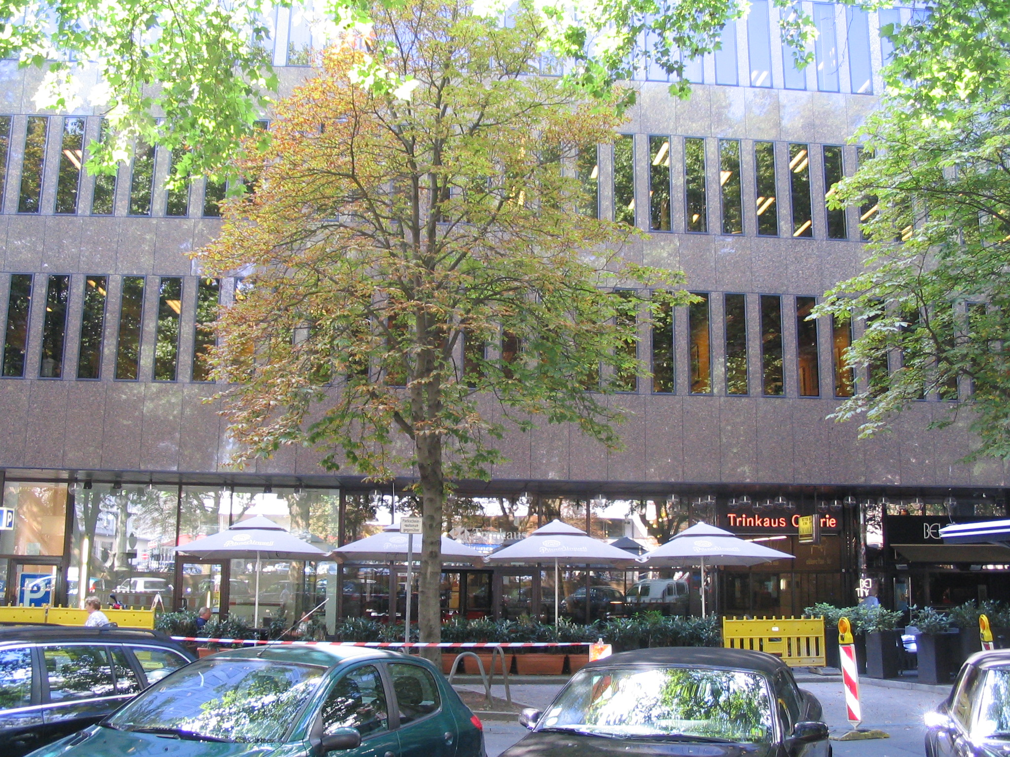 Königsallee 21 Trinkaus Galerie, August 2011.